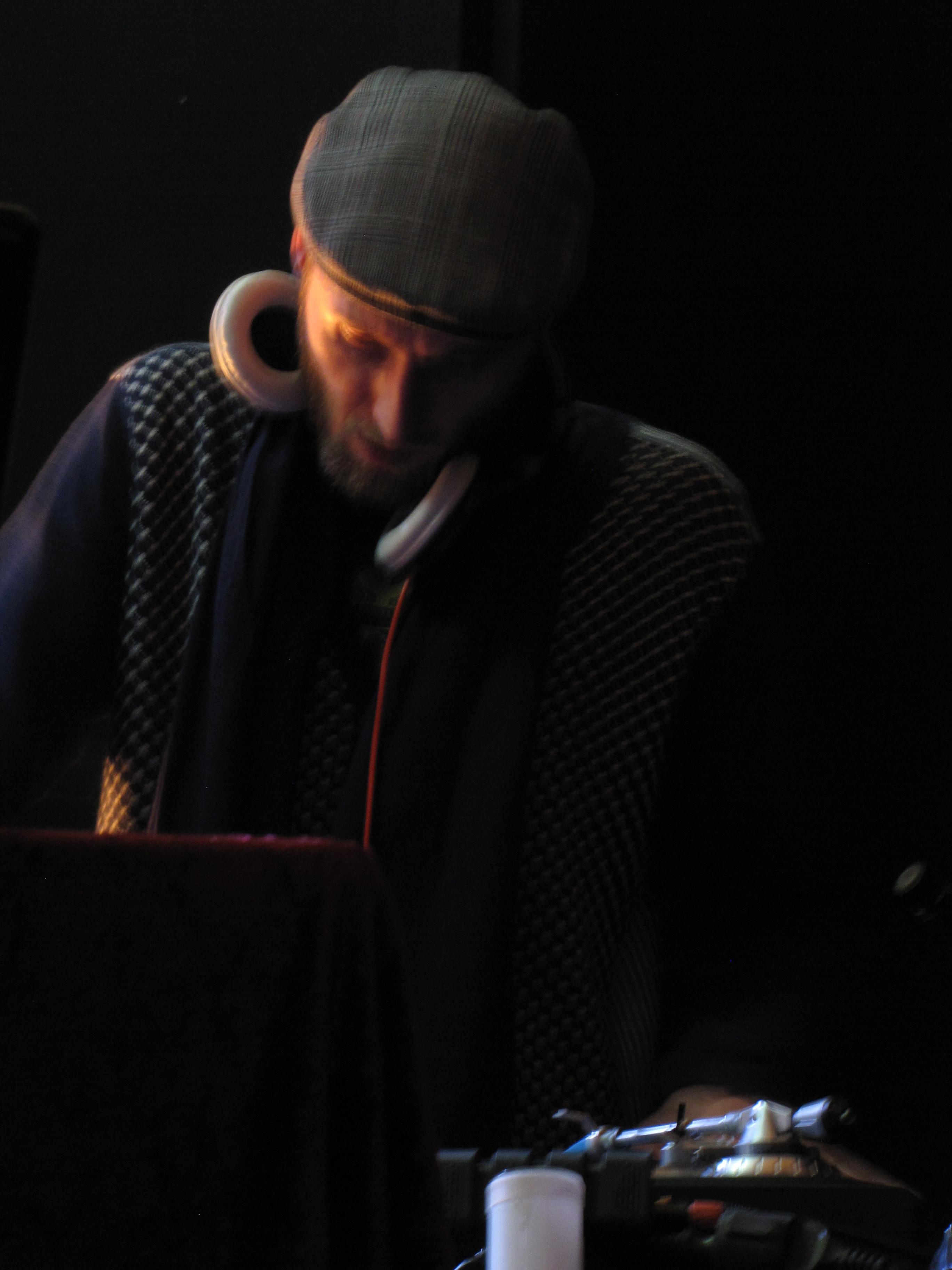 Ulver live at Budapest